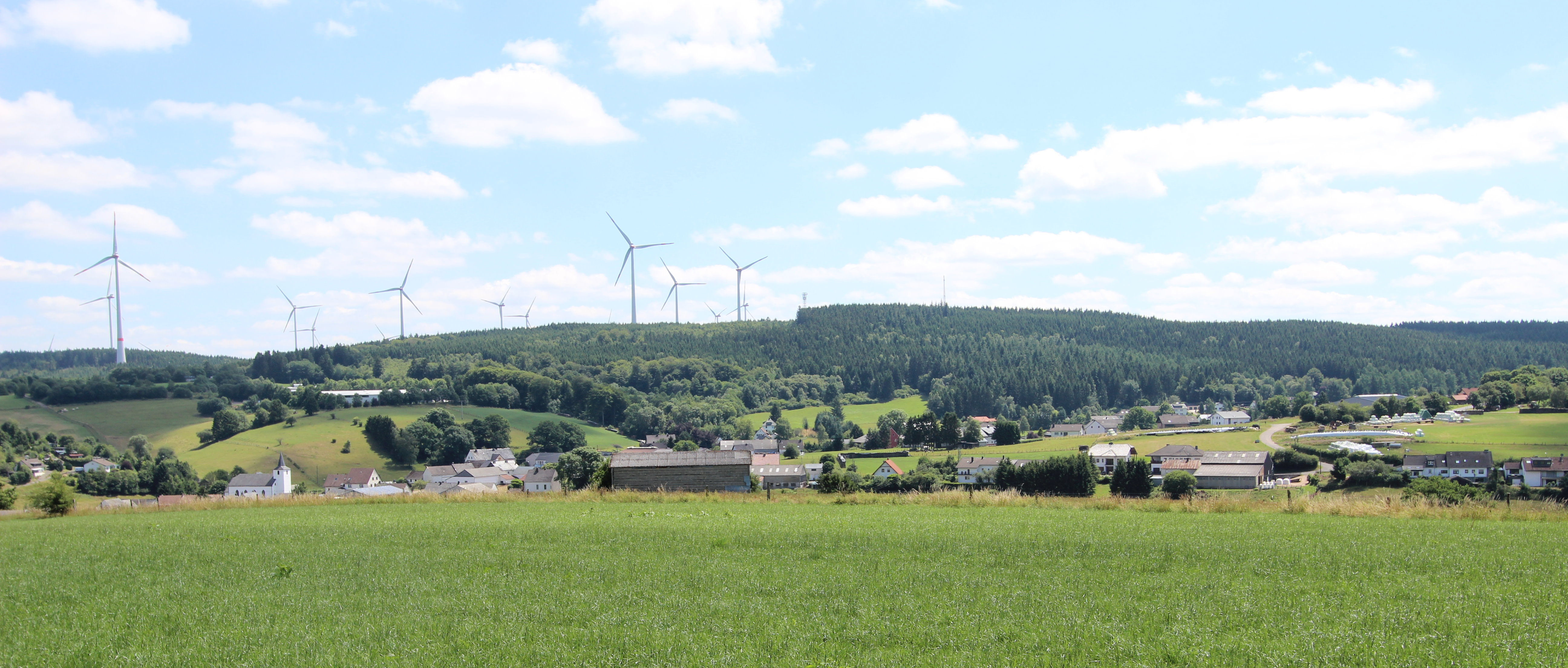 54597 Ormont, nord-westlich des Ortes an der K76 aus Richtung Kehr. Aufnahme von 2017.